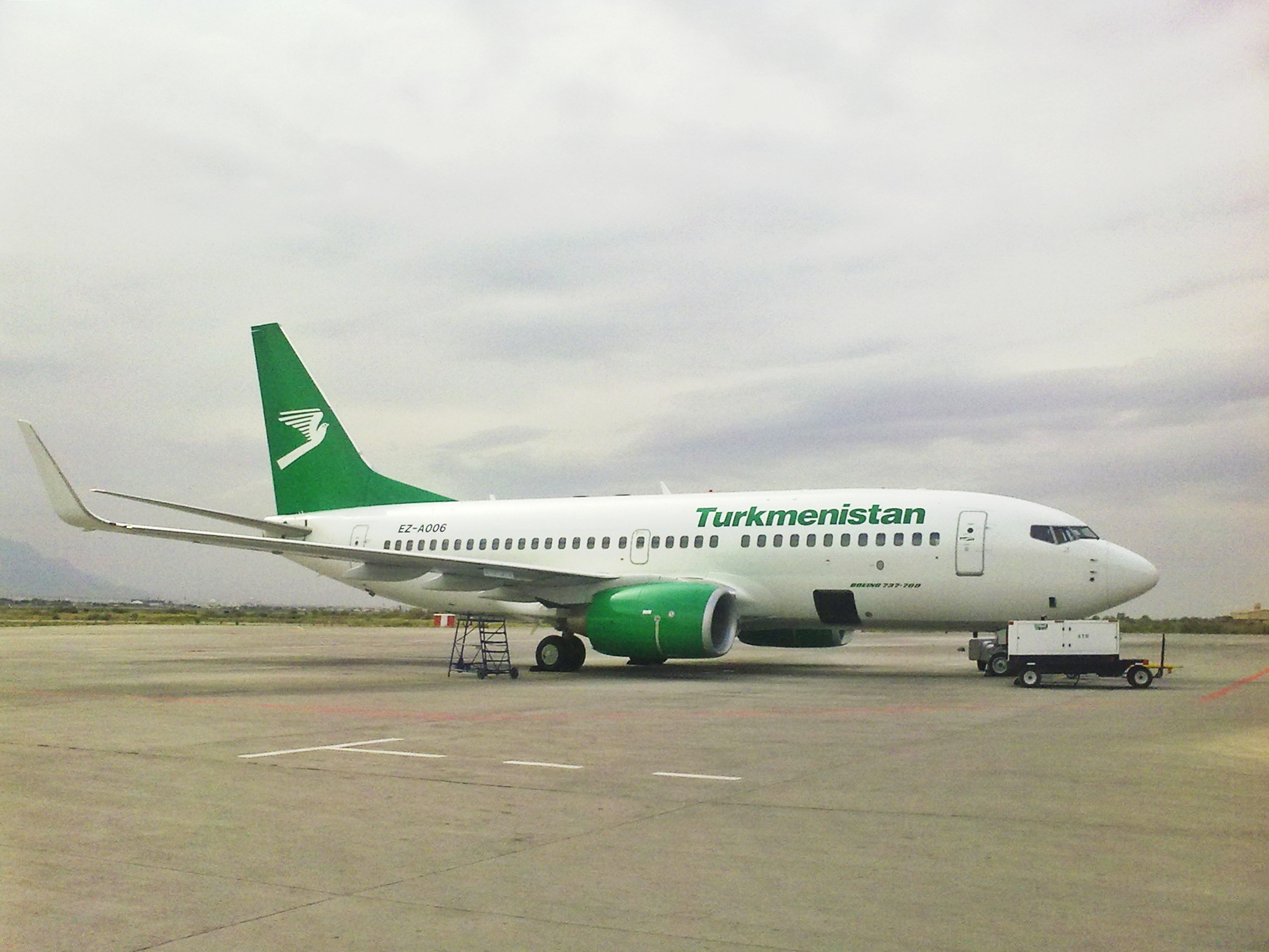 Боинг 737-700 Туркменских Авиалиний